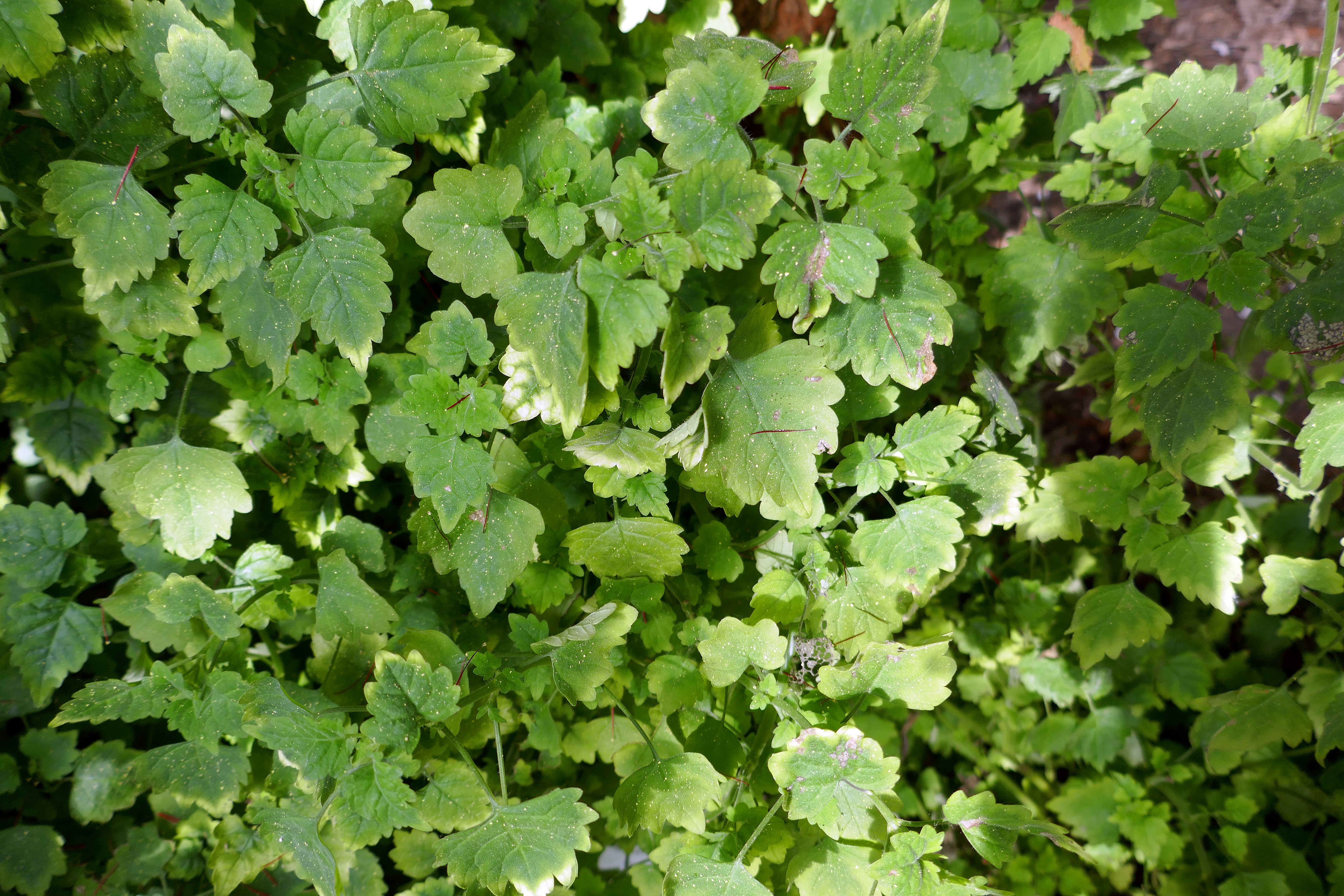 Plectranthus saccatus (White) Benth. nl: Mottenkoning fr : Plectranthe Afrique australe. Jardin botanique Meise (Belgique).